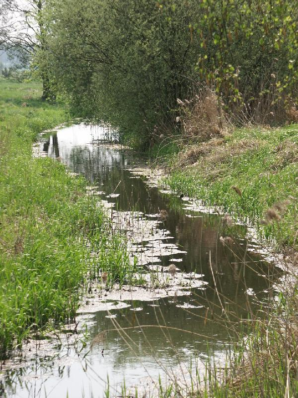 Delvenau bei Witzeeze, nördlich der Dückerschleuse. Blick nach Süden.